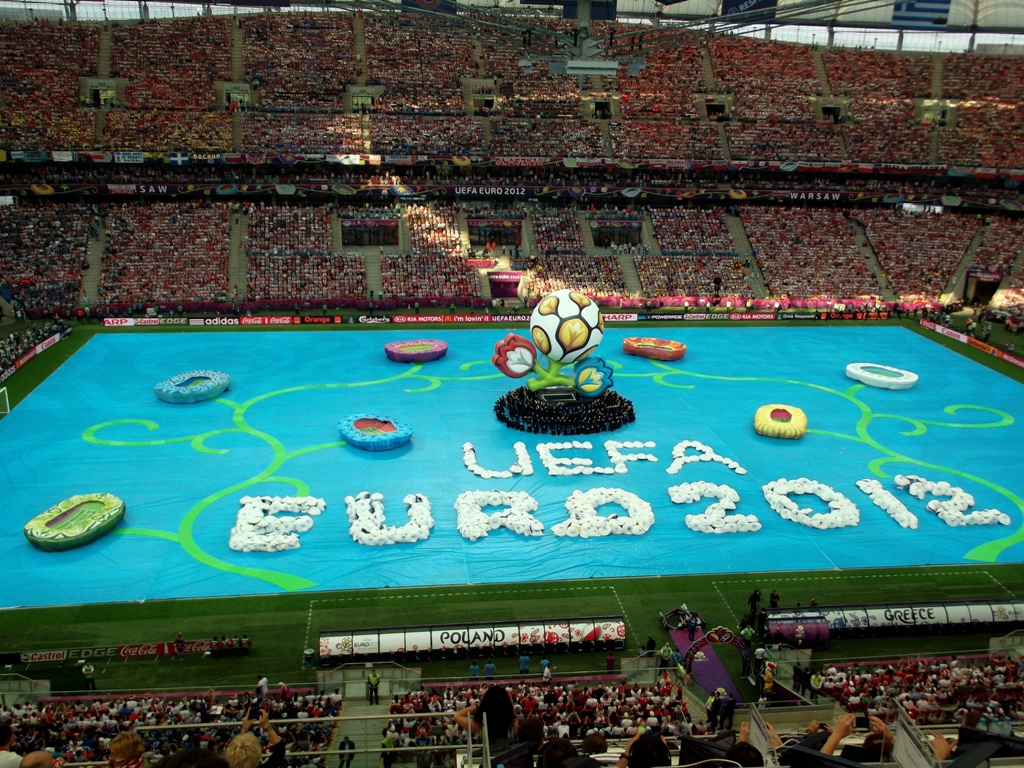 Zdjęcie zrobione w pierwszym dniu UEFA Euro 2012 w Warszawie, dniu otwarcia turnieju i meczu Polska-Grecja.